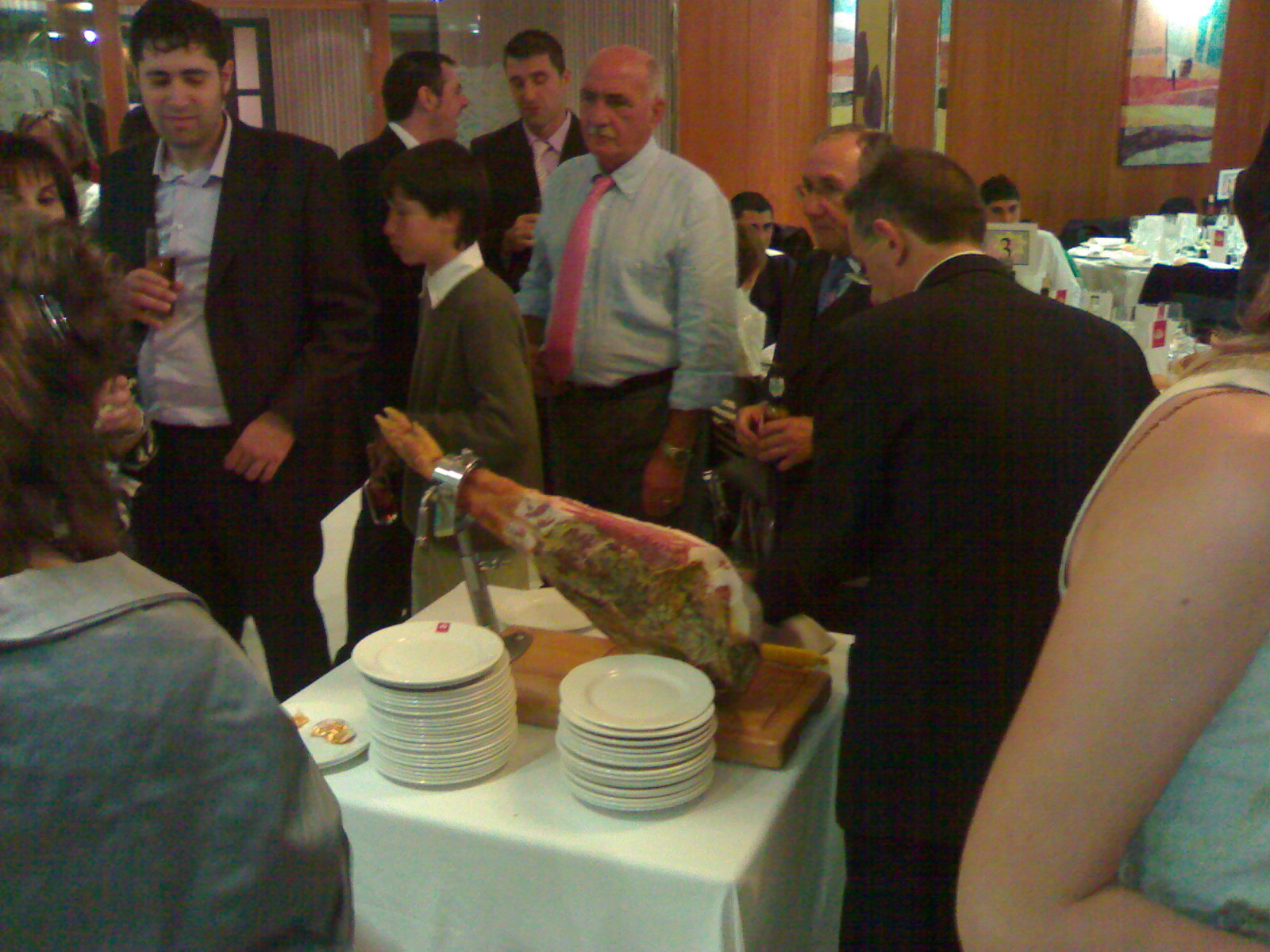 Cata de jamón D.O Teruel en el Hotel El Milagro.